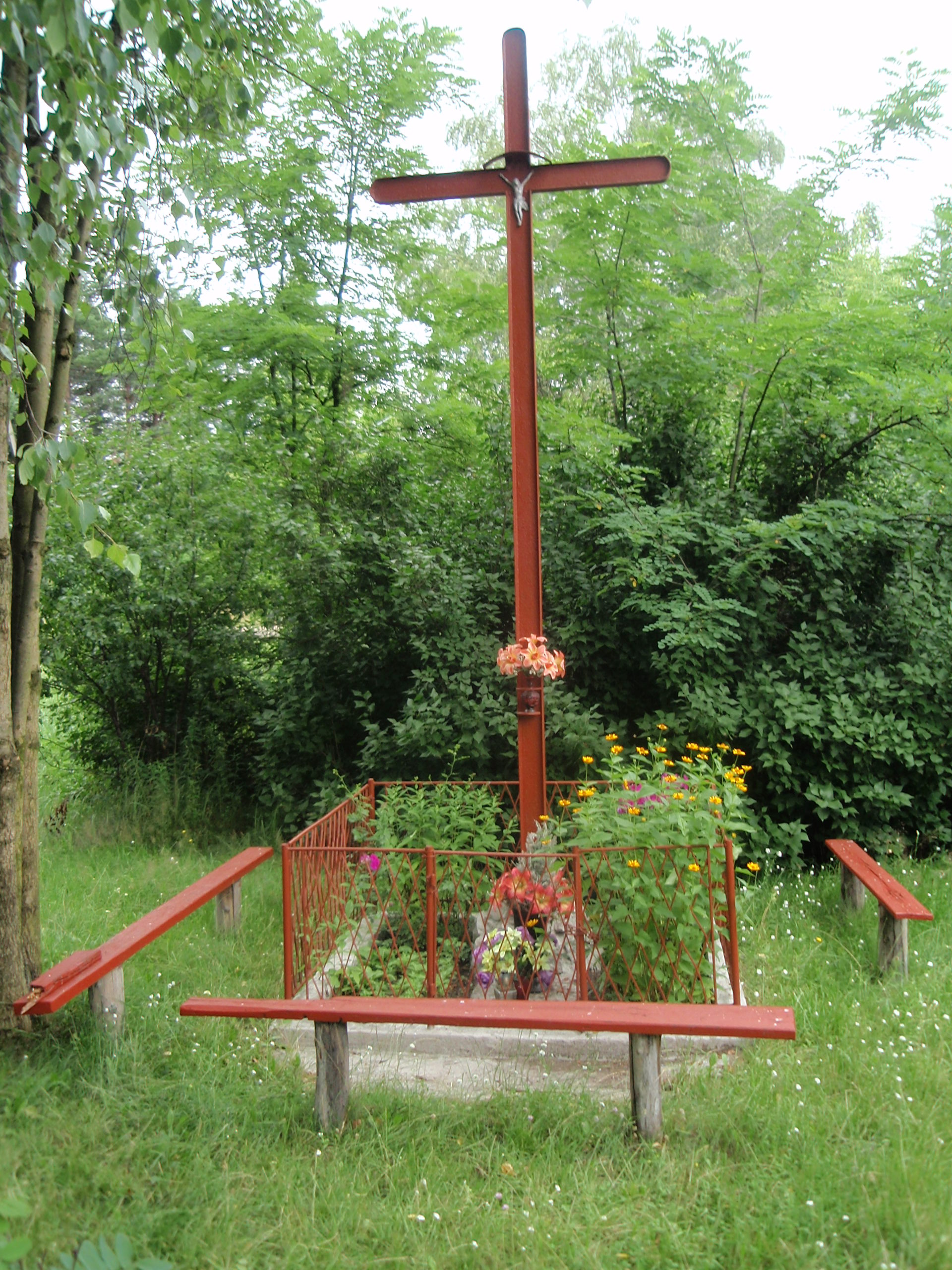 Krzyż przydrożny w Starych Maczkach (Sosnowiec)